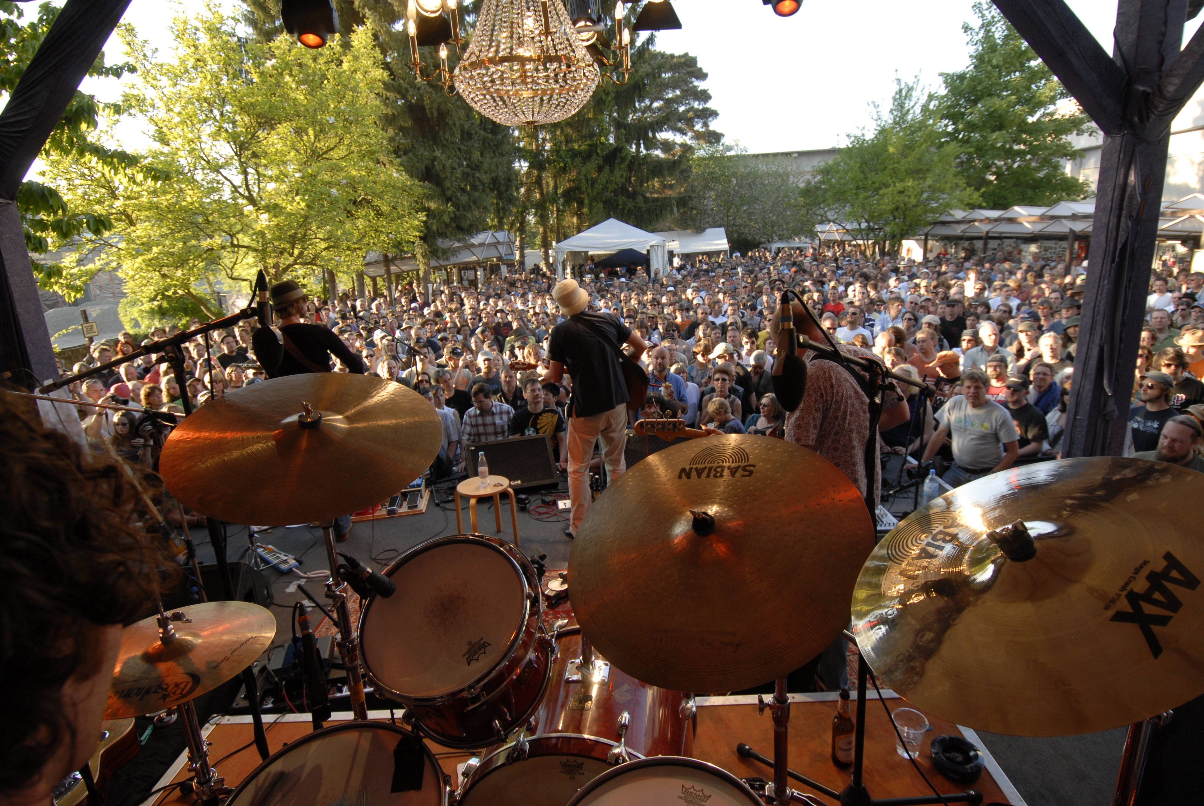 OBS-Motto 2008: Da Hinten Wird's Hell